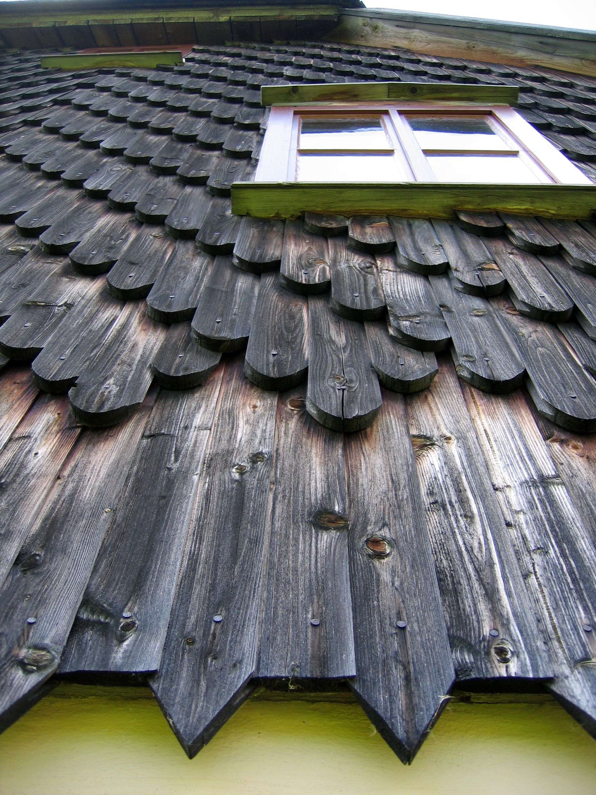 Erzgebirgisches Freilichtmuseum Seiffen, Juli 2009